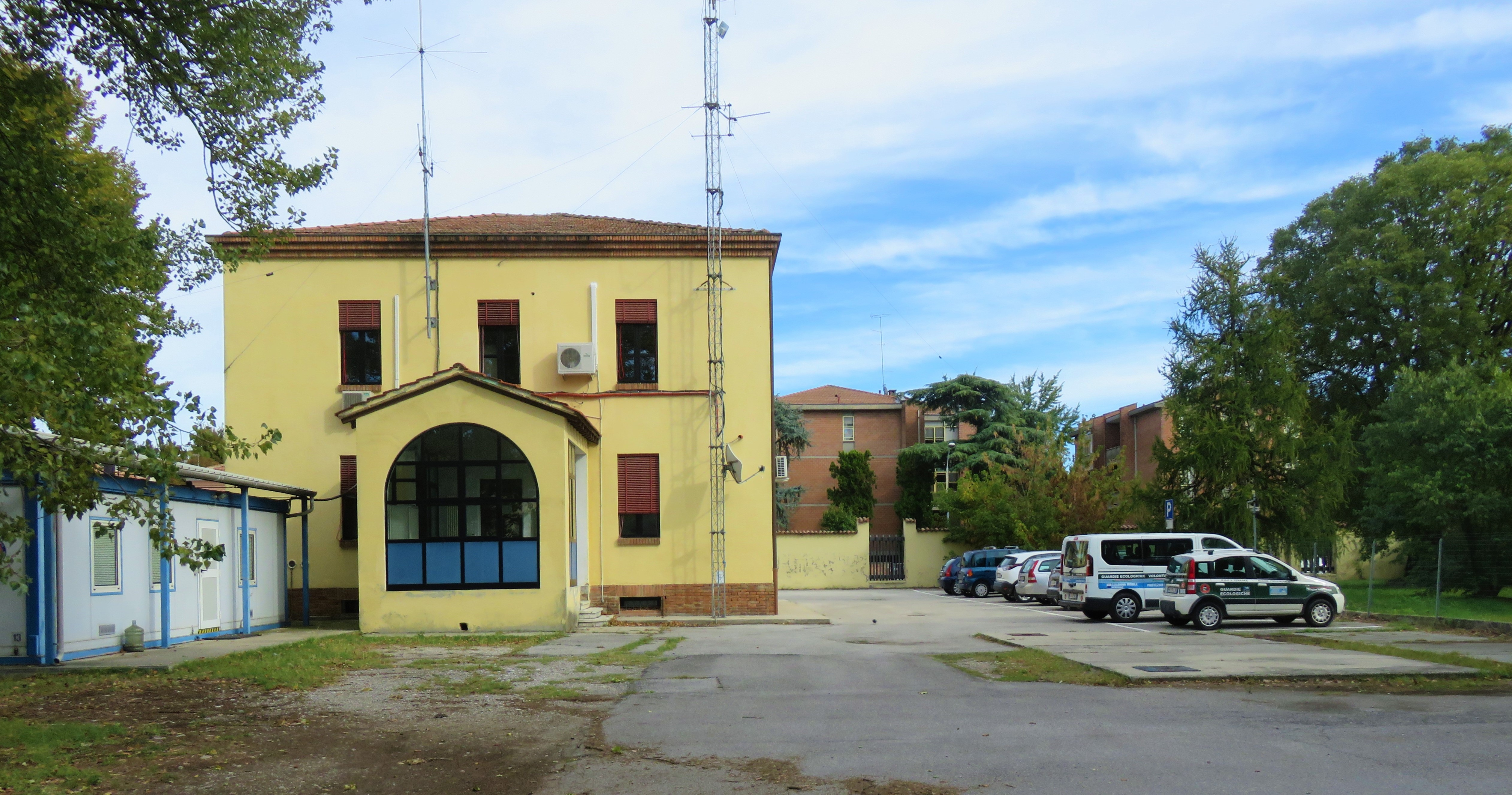 area protezione civile nel complesso ex Linificio Canapificio